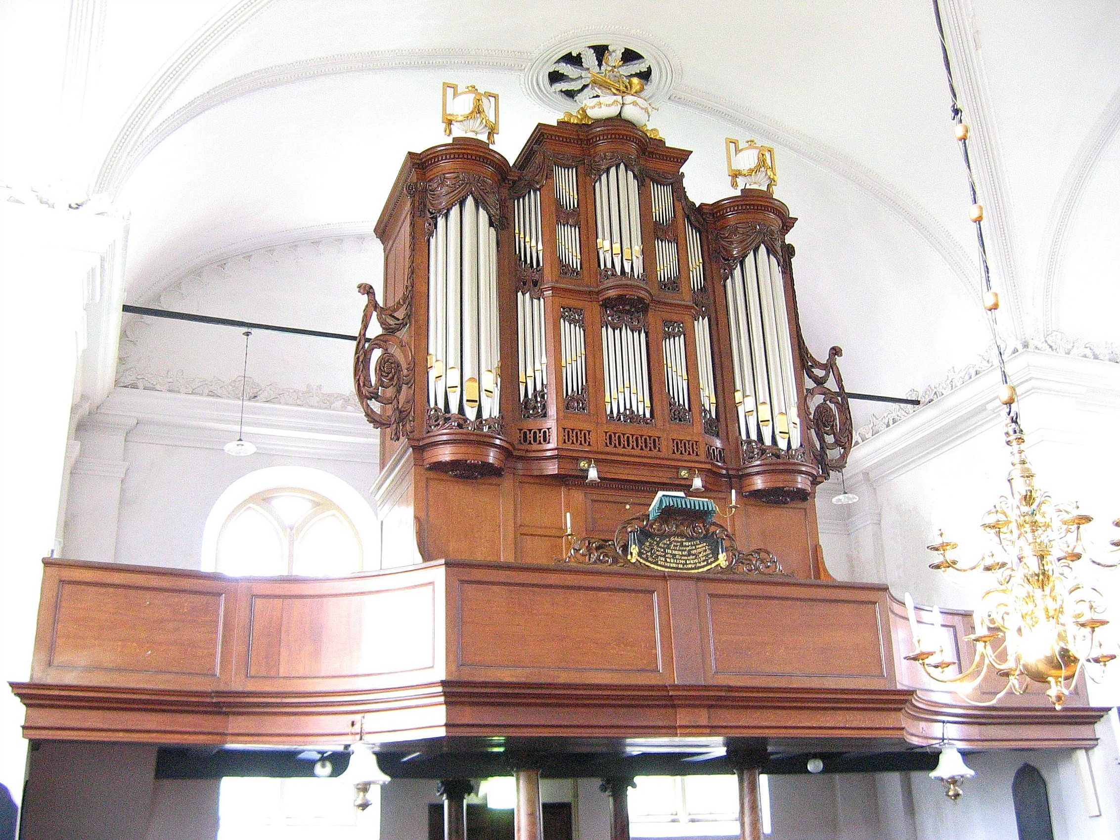 Orgel in Oostwold, Niederlande